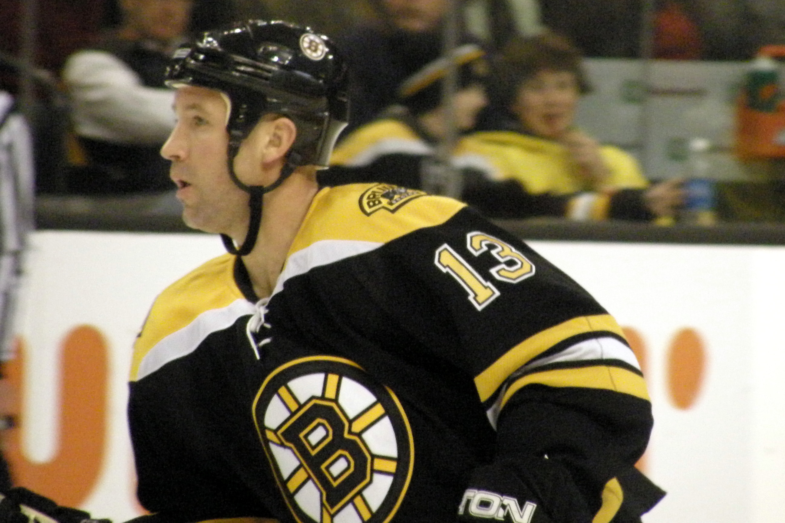 #13 Glen Metropolit (C)